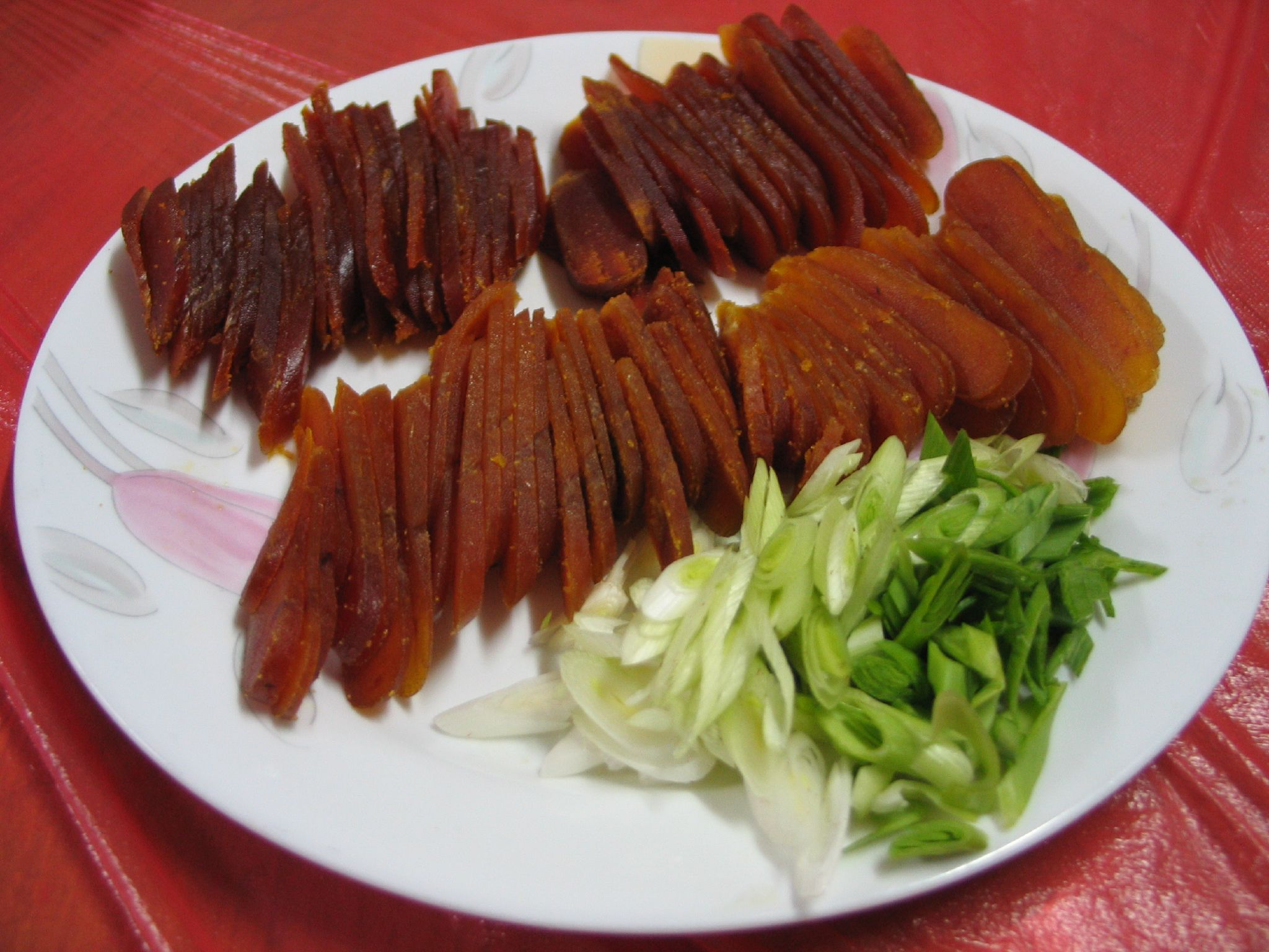 兩排烏魚子來源、味道皆不同，其中一排的比較好吃。烏魚子即是烏魚的卵，平時在喜宴的場合第一道的冷盤是最常見的一道菜。平常我們自己也只有逢年過節或是家人聚會在家用餐時才會食用。還是自己買的烏魚子比較好吃，很鮮美的味道！險要將烏魚子外的薄膜去除，浸泡米酒（米酒為去腥、增加風味之用）後，以烤箱或是平底鍋微烤過後，放冷之後切片，配生蘿蔔片或是蒜苗就很美味。烏魚子